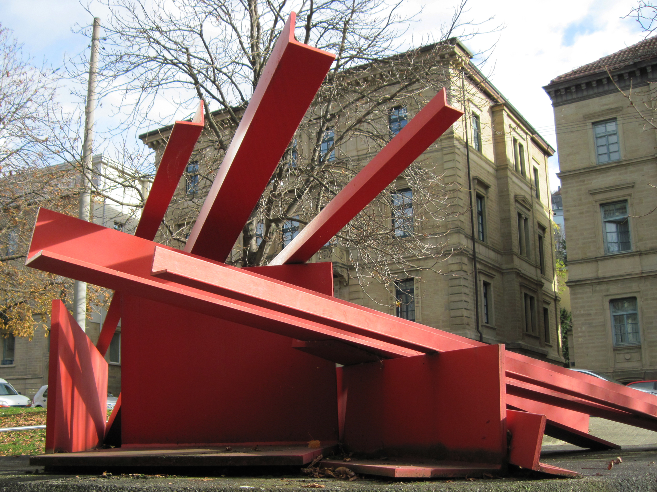 Christoph Freimann, Skulptur an der Olgastraße, 1981, - Deutschland, Baden-Württemberg, Stuttgart, Olgastraße 2